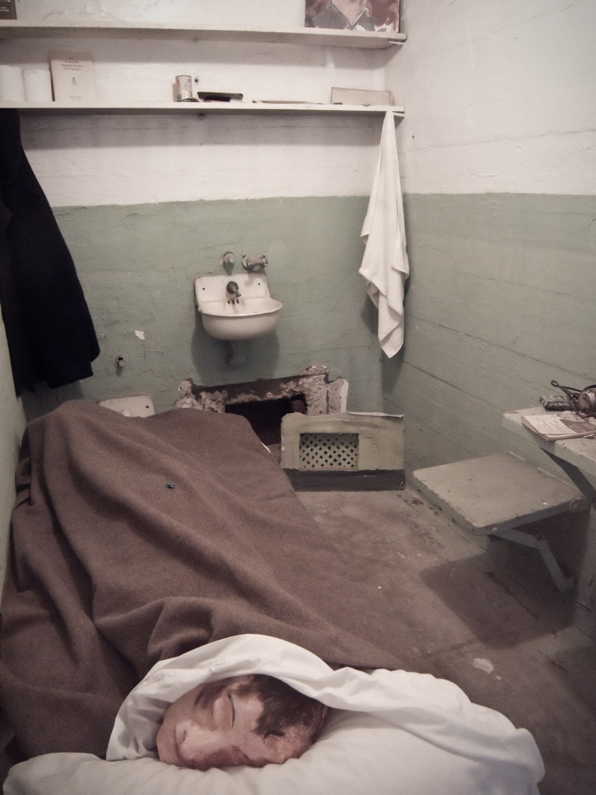 June 1962 Alcatraz escape